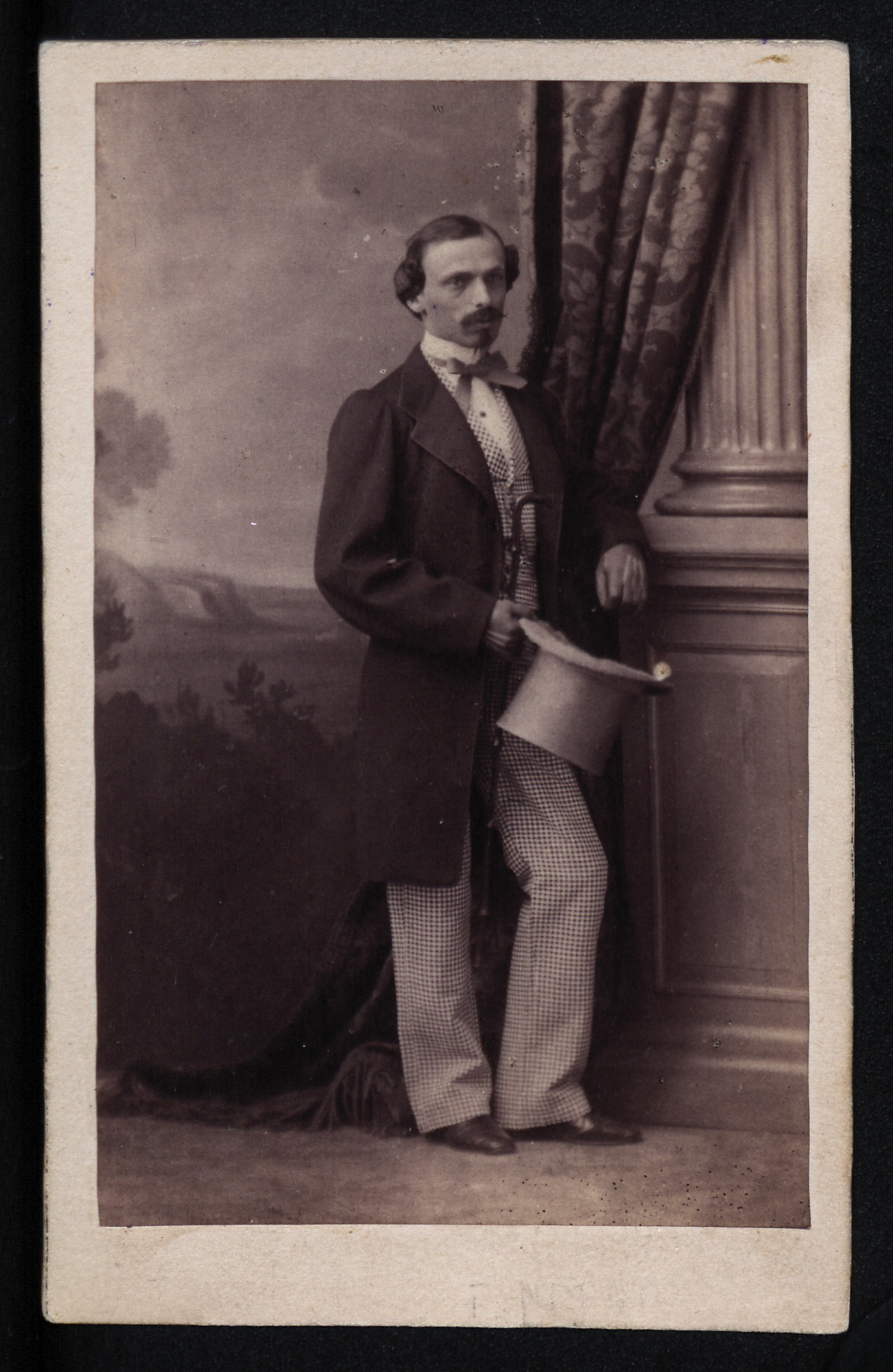 Portret Witolda Lanciego, fotografia Karola Beyera, [ca 1860].